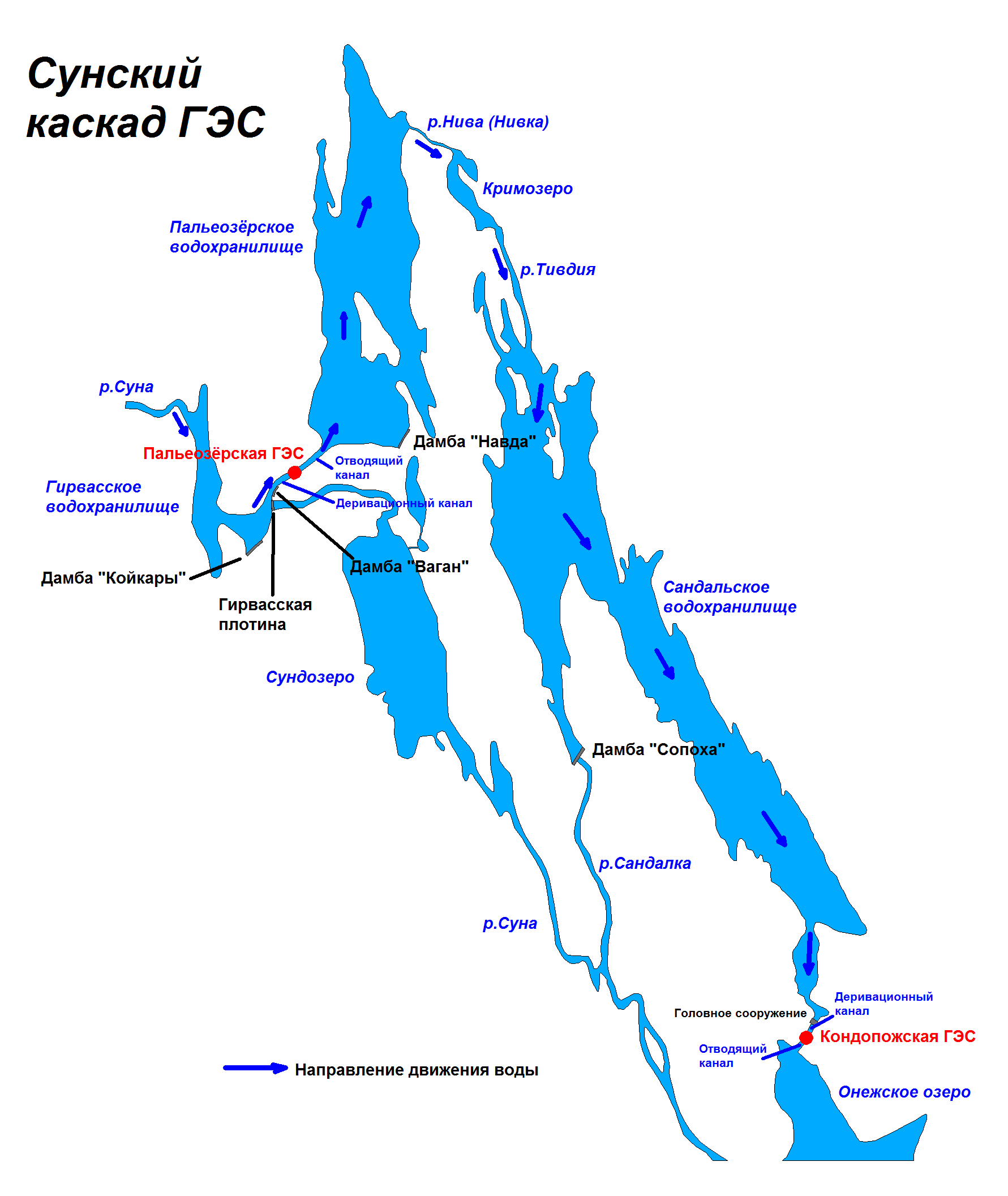 Схема Сунского каскада ГЭС